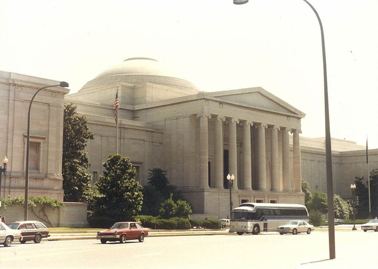 Bâtiment ouest de la National Gallery of Art, à Washington, D.C. Juste à droite de ce bâtiment se trouve un jardin de sculptures rattaché à ce musée d'art, le National Gallery of Art Sculpture Garden.